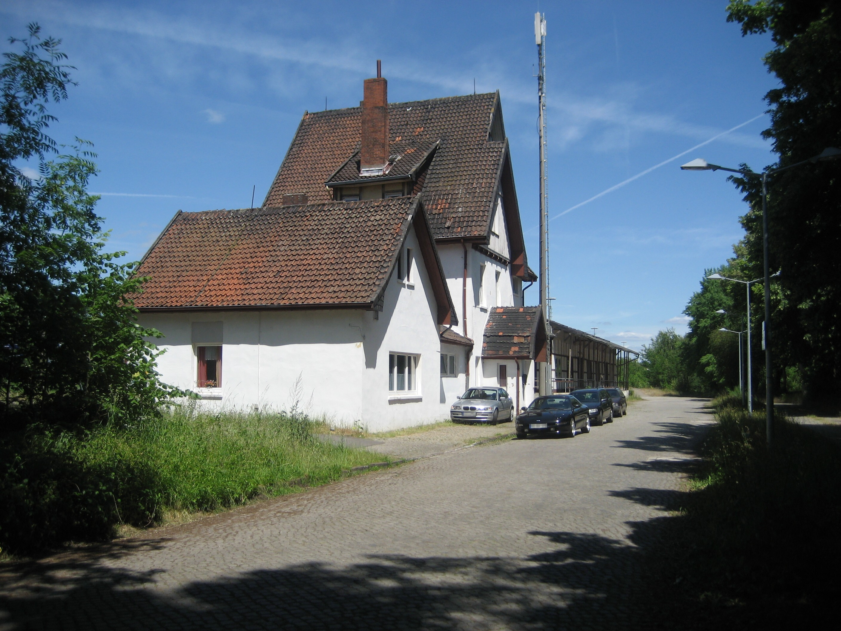 Bahnhofsgebäude des Bahnhof Leese-Stolzenau, von der Bahnhofsstraße aus gesehen